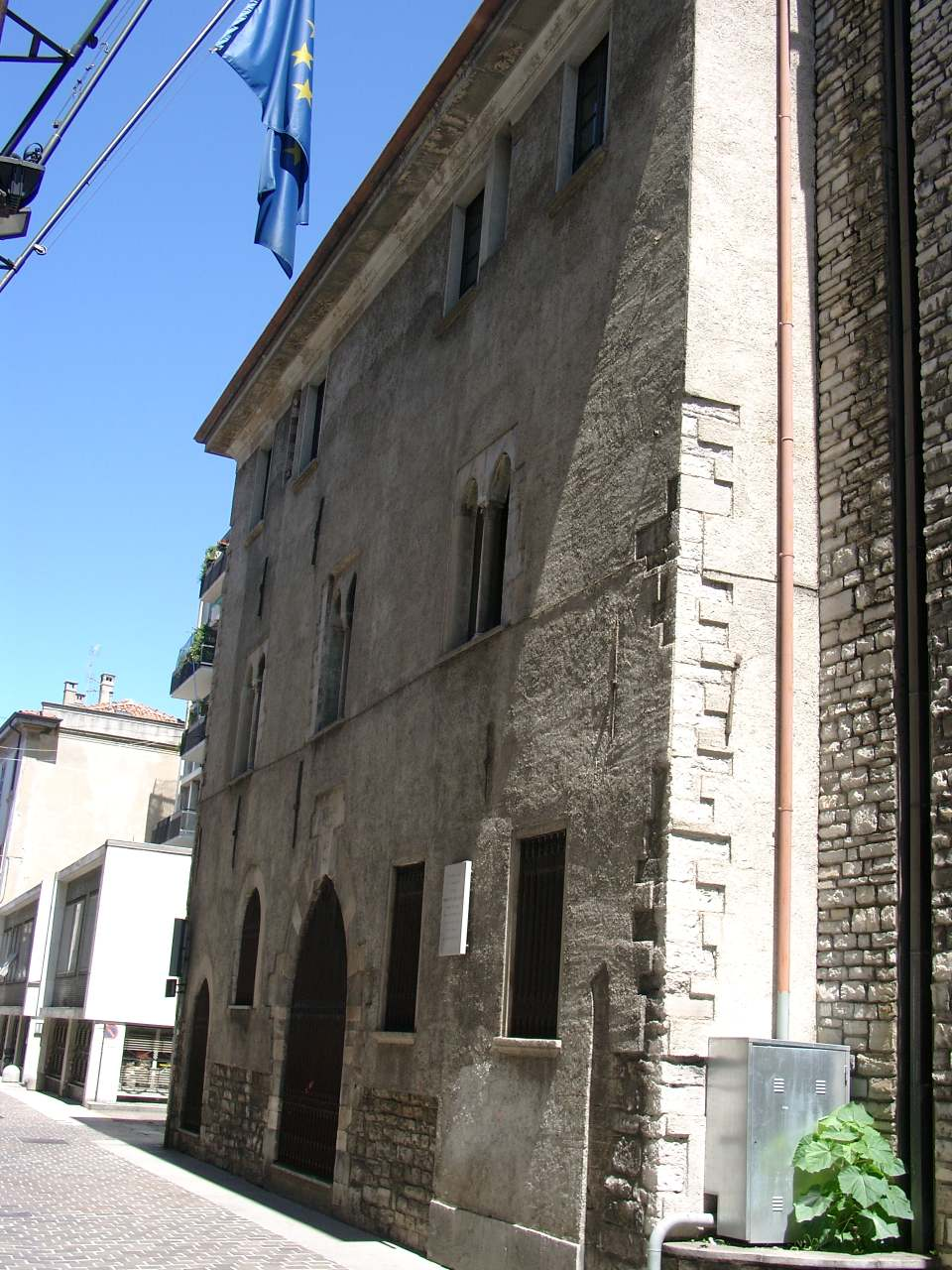 Como, casa natale di papa Innocenzo XI (16 maggio 1611 – 12 agosto 1689), nato Benedetto Odescalchi